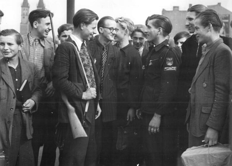 Zentralbild Rösener 15.9.1952 Zi-Ho. "Dienst für Deutschland" 60 Jugendfreunde aus dem Bezirk Magdeburg fuhren in die Lager der Organisation "Dienst für Deutschland", um an den Schwerpunktbauten des Sozialismus der DDR zu helfen. UBz: Günther Schöneberg aus Wanzleben, der beste Einzelwerber für die Volkspolizei hat als Prämie eine Luftbüchse bekommen. "Die wird selbstverständlich mitgenommen." erklärt er dem Transportleiter Harry."